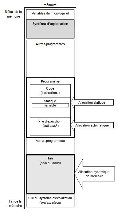 Représentation graphique des trois modes d'allocation en mémoire.